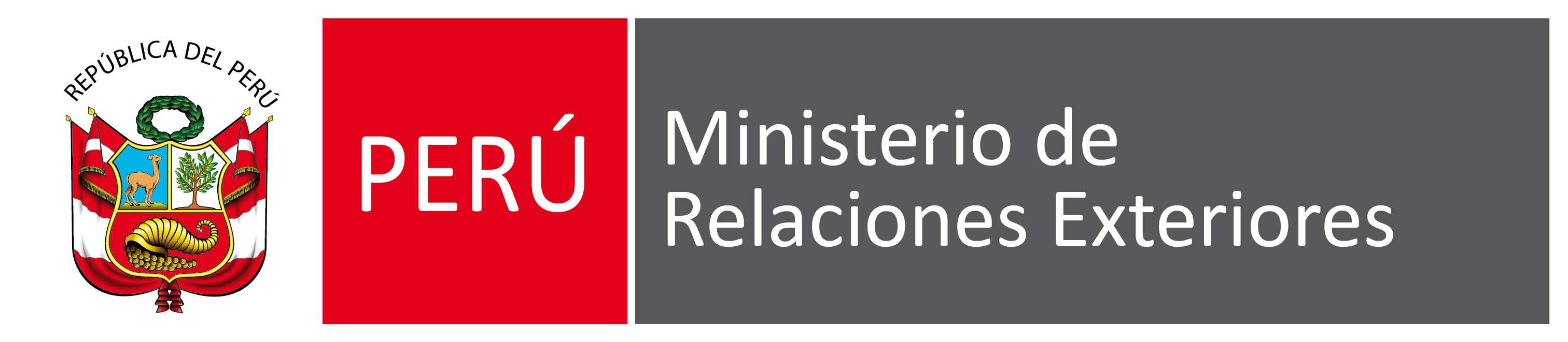 Ministerio de Relaciones Exteriores del Peru